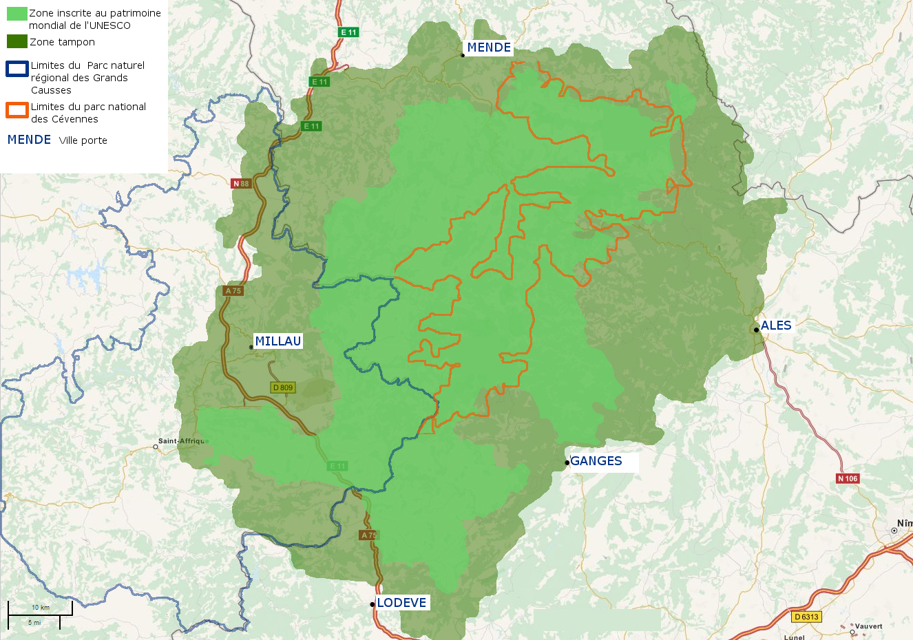 Carte du territoire des Causses et des cevennes Cevennes protégés à L'UNESCO